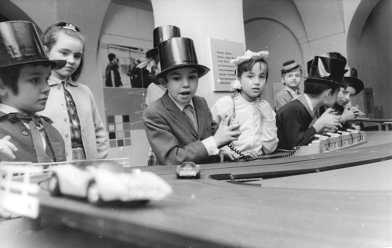 Neujahrsfest für Junge Pioniere Zentralbild Franke 11.1.71 Berlin: Ein Jolka-Fest fand am 11.1.71 im Zentralhaus der Jungen Pioniere "German Titow" für Kinder aus verschiedenen Ländern statt. Spaß macht das Spiel an der Autorennbahn Jolanta Gorska, Janos Kanyo und Danuta Jarosz (v.2.v.l. nach r.).